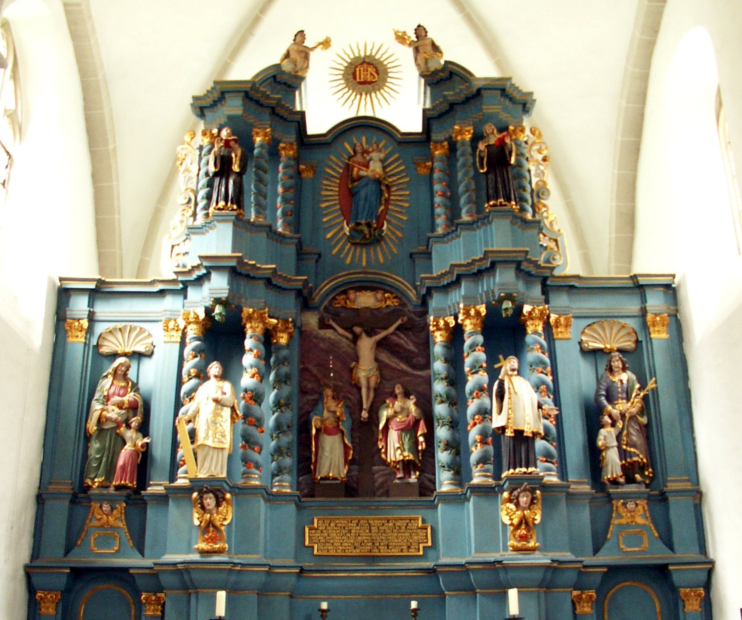 Barocker Hochaltar der Klosterkirche des Klosters Gertrudenberg in Osnabrück, geschaffen 1717-1729 von Thomas Simon Jöllemann, oberer Teil